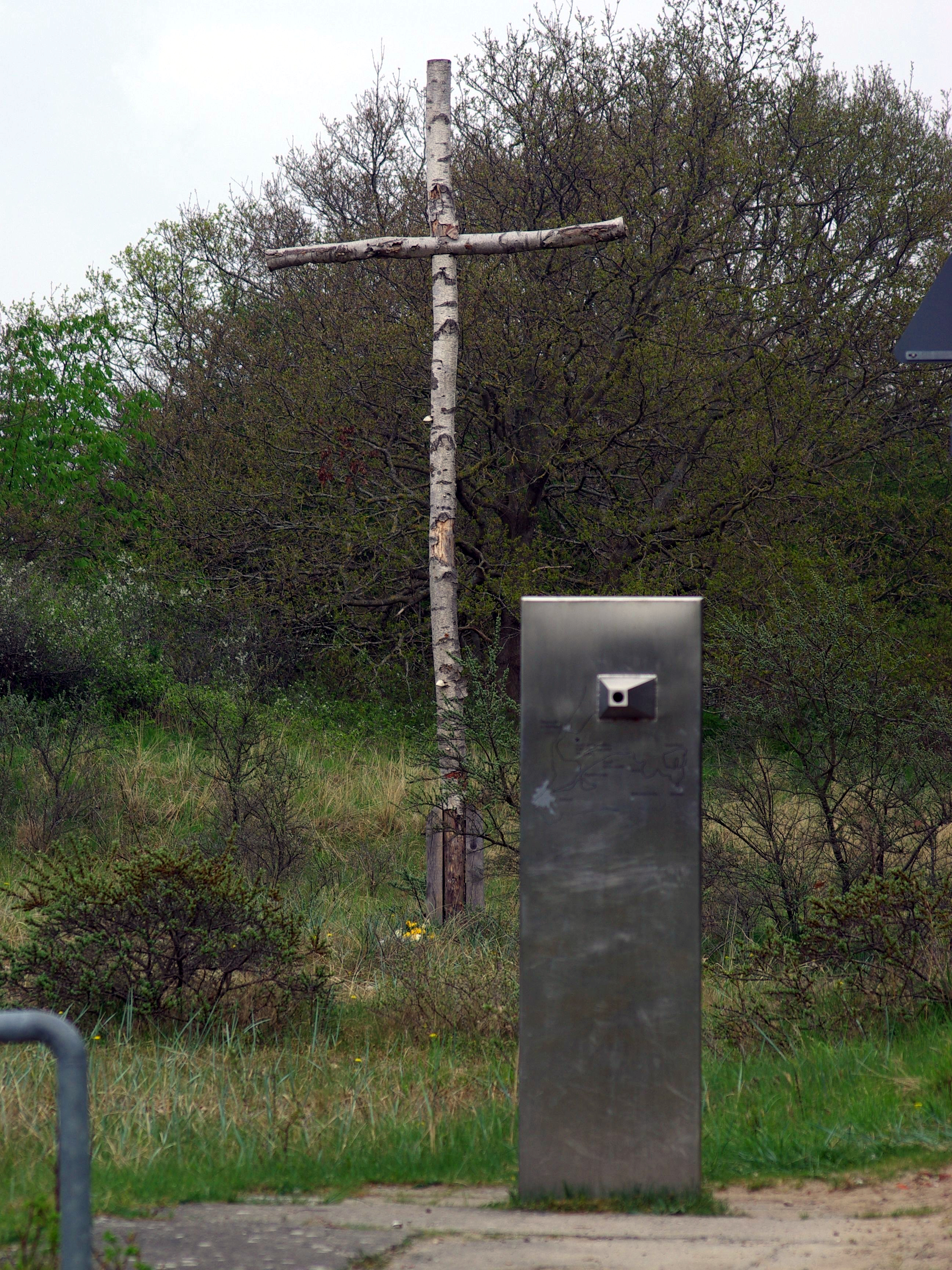 Die im Jahre 2006 in Groß Schwansee errichtete Gedenkstätte für das Gedenken auch an die nicht beigesetzten Opfer des Untergangs der Cap Arcona.